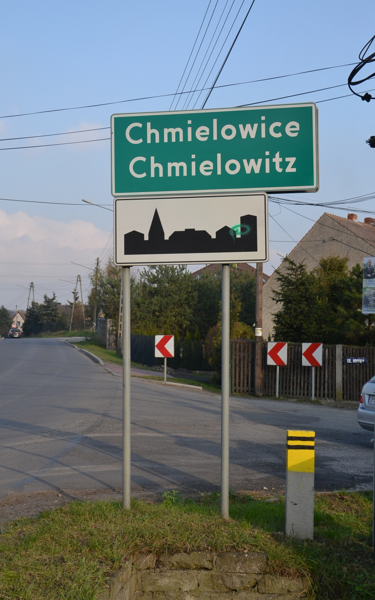 Chmielowice - Chmiellowitz - Polnisch-deutsches Ortsschild mit einem Fehler